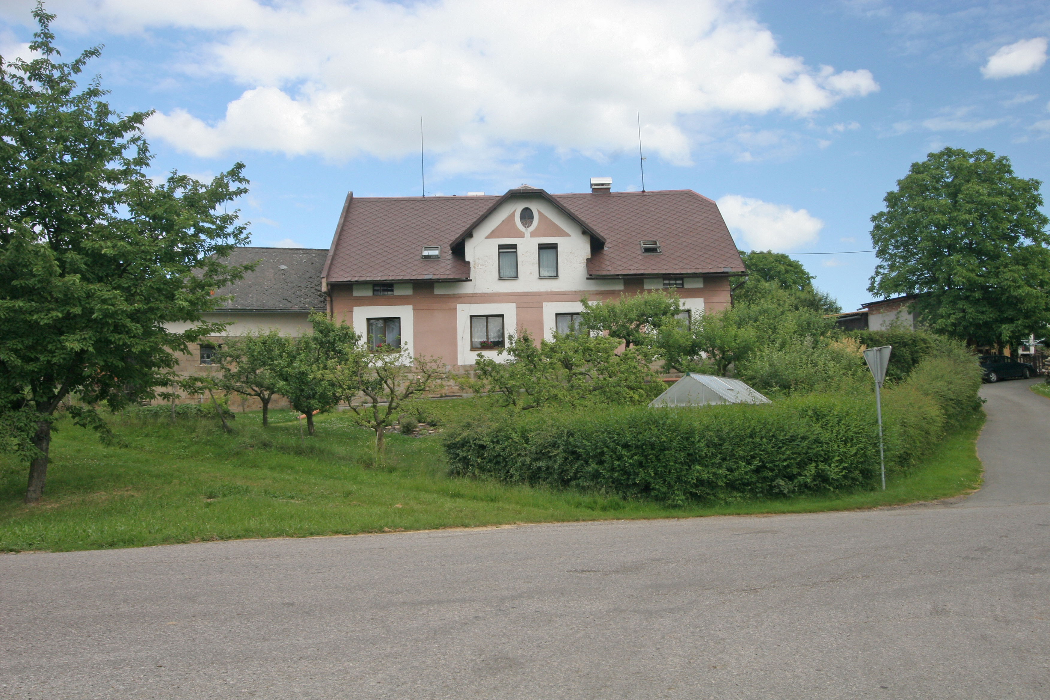 Libotov čp. 46